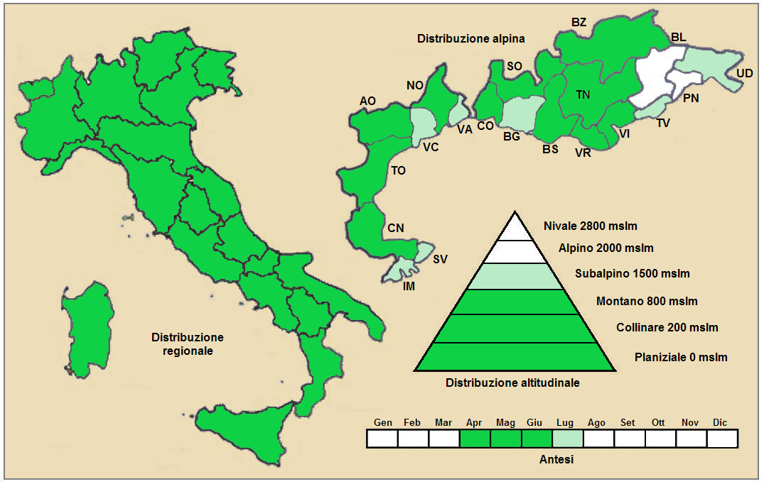 Forasacco dei tetti (Bromus tectorum) - Distribuzione italiana